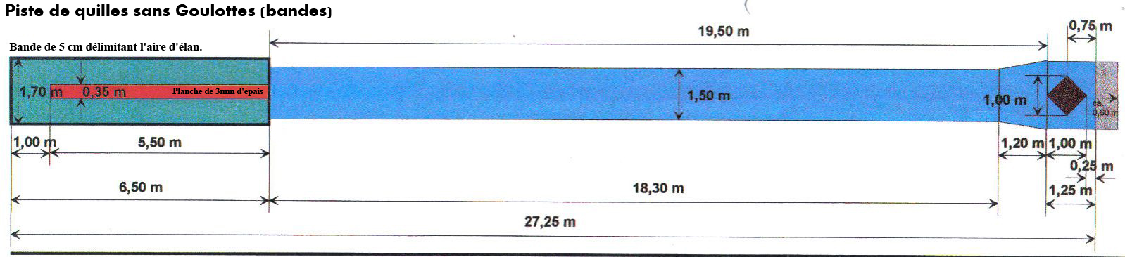 Piste de quille avec des bandes